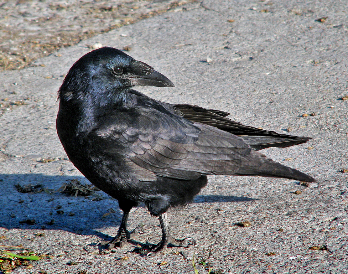 Råka (Corvus frugilegus), Ystad, Sverige.